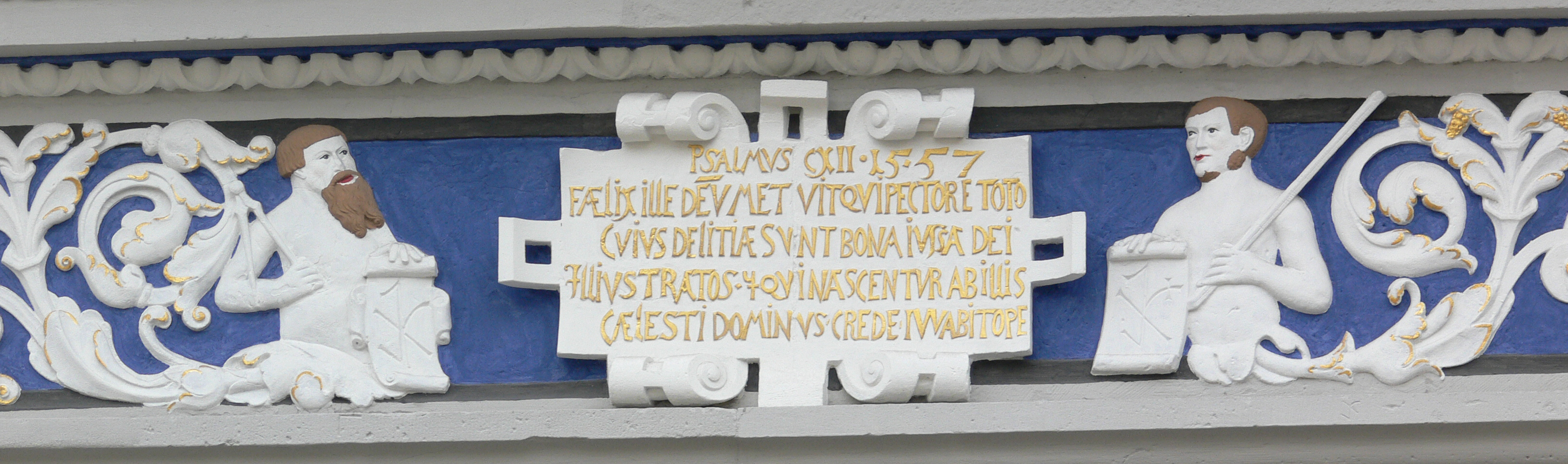 Haus Dacheröden am Anger in Erfurt